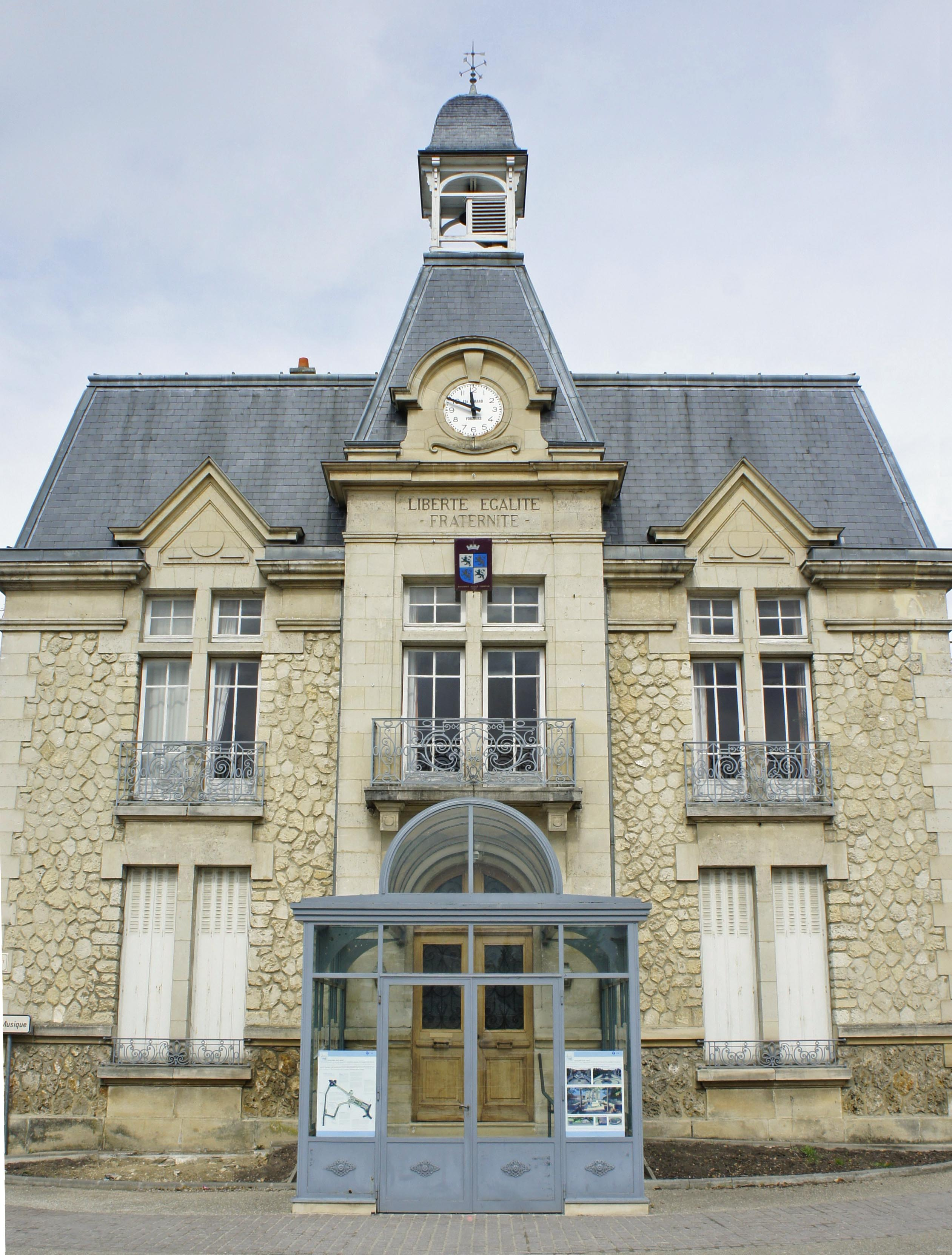 Mairie de Jonchery sur Vesle.